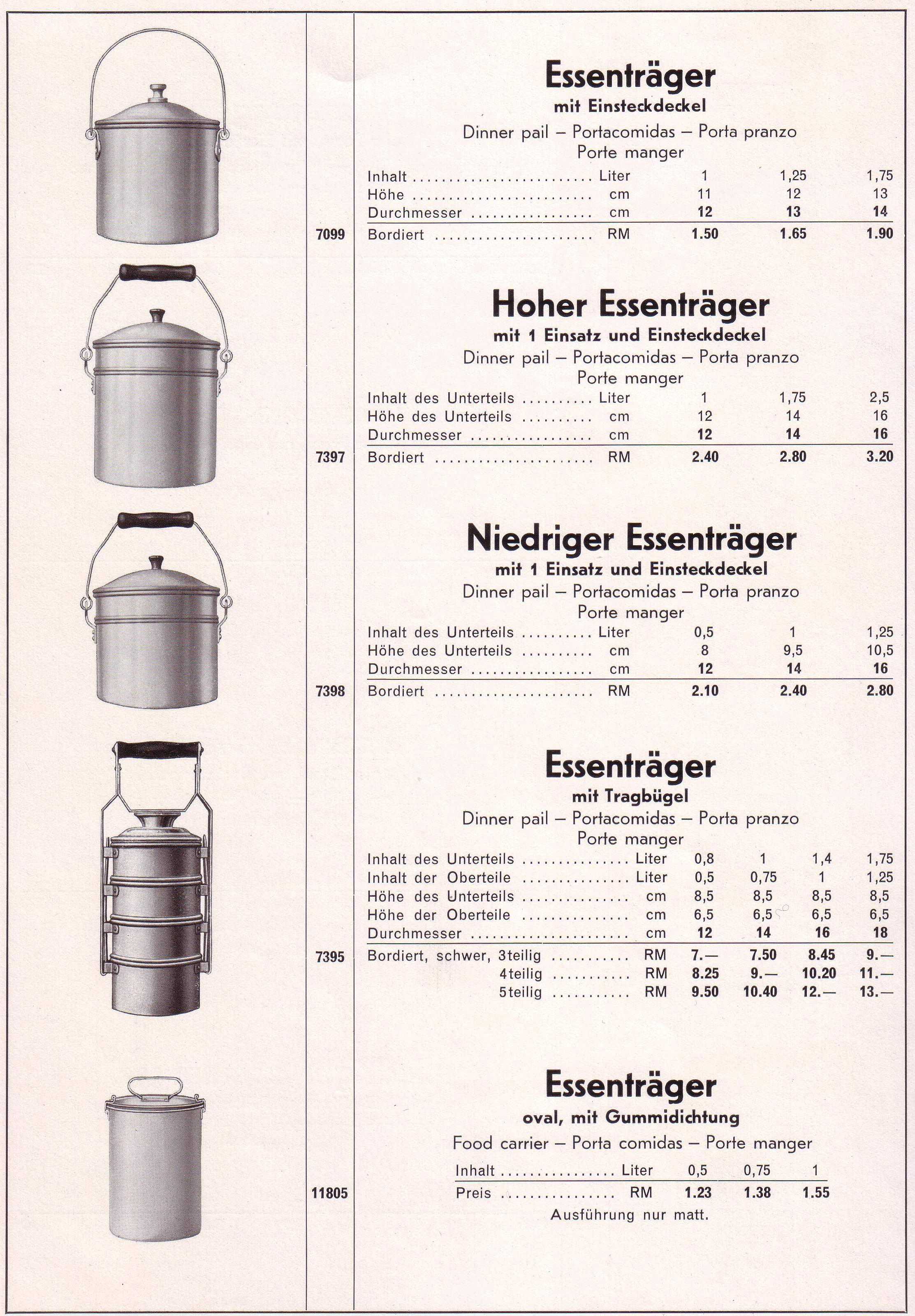 Seite 22 der Preisliste Nr 15 der Polte Aluminiumwerke, Essenträger